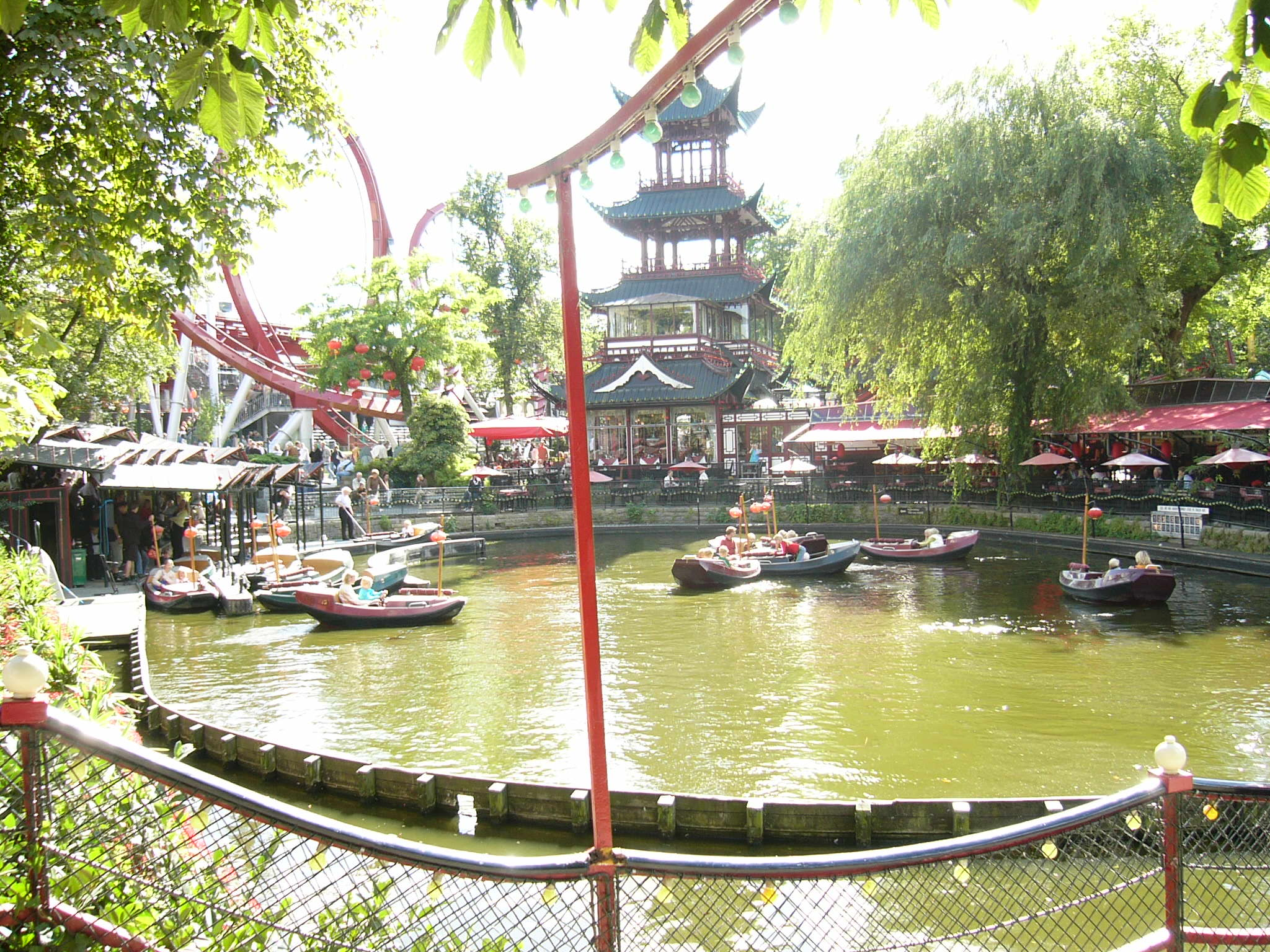 Pagoda china no Tivoli